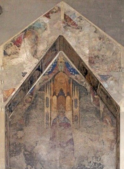 Affresco Gloria di Sant'Agostino di Martino da Verona (1426 circa). Chiesa di Santa Eufemia di Verona